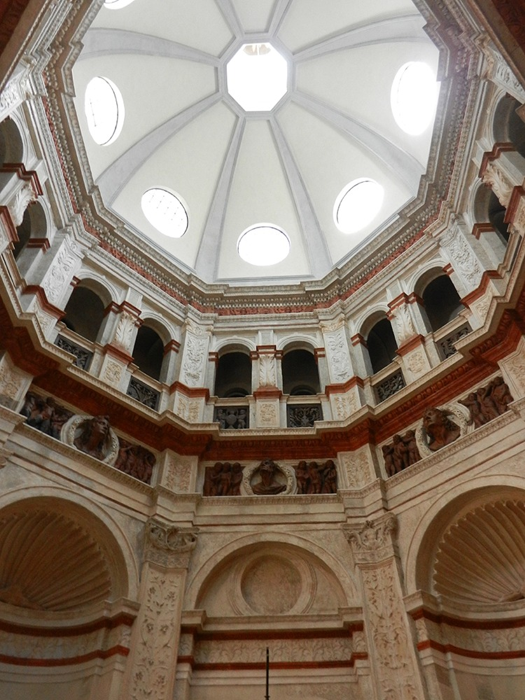 Milano - Vista interna della cupola del Battistero della Chiesa di S. Maria presso S. Satiro